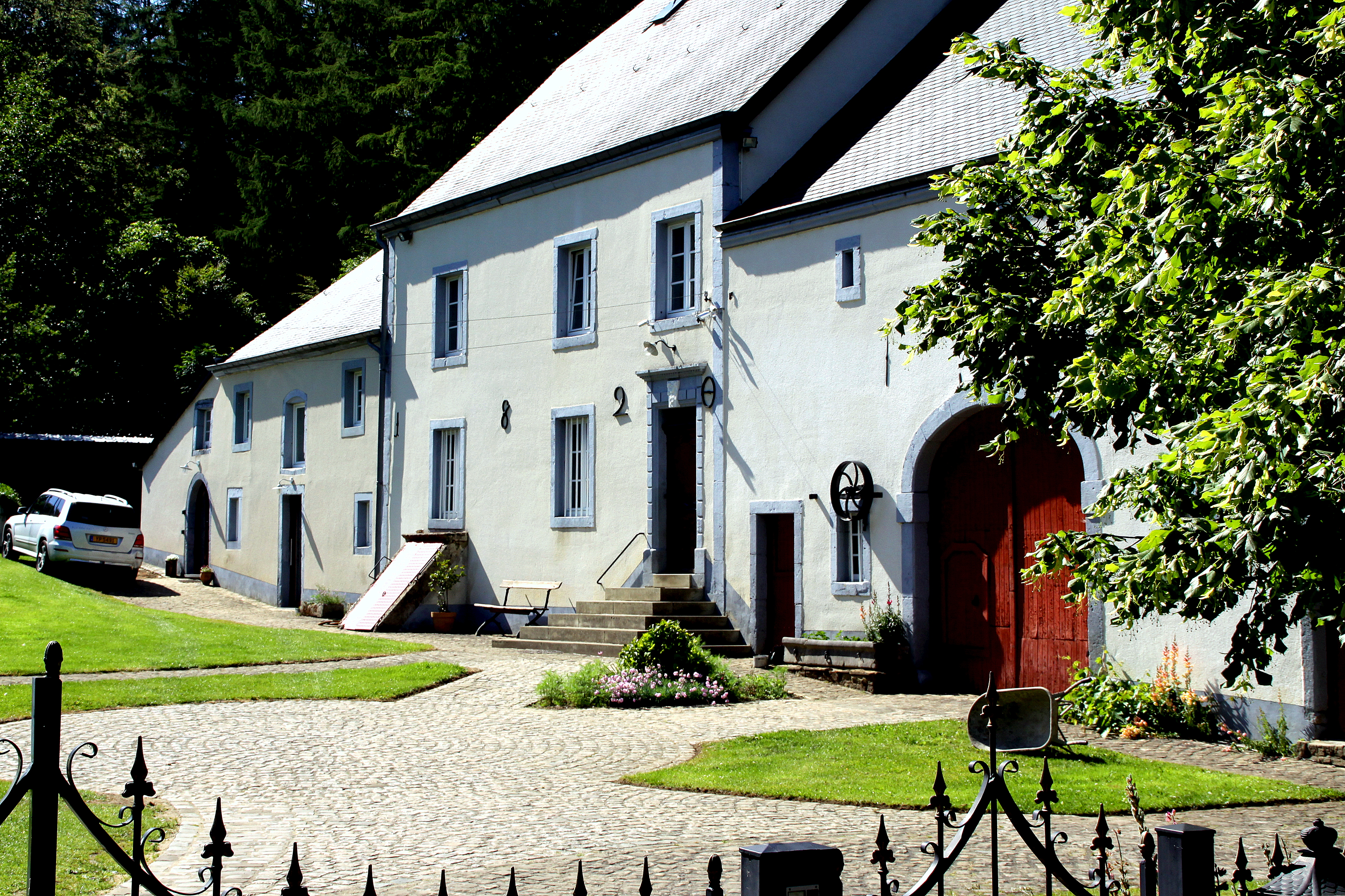 D'Platinerei bei Bunnert